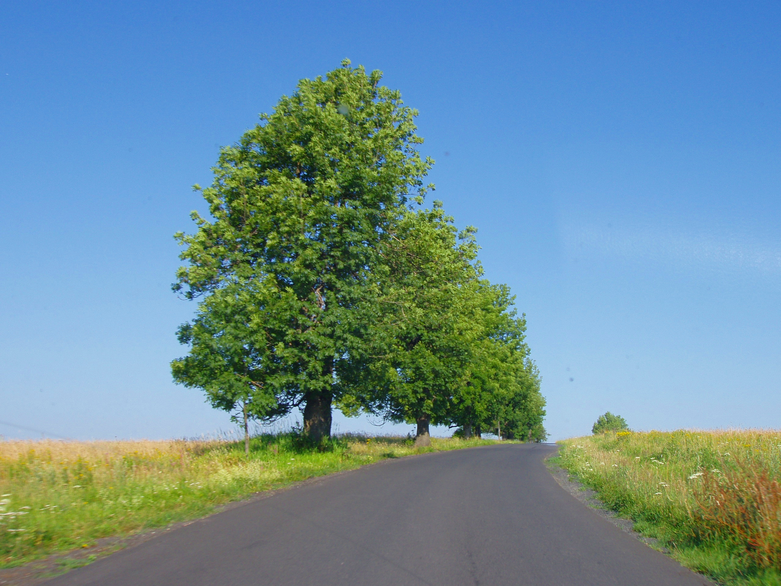 Lipová alej mezi Nakléřovem a Krásným Lesem